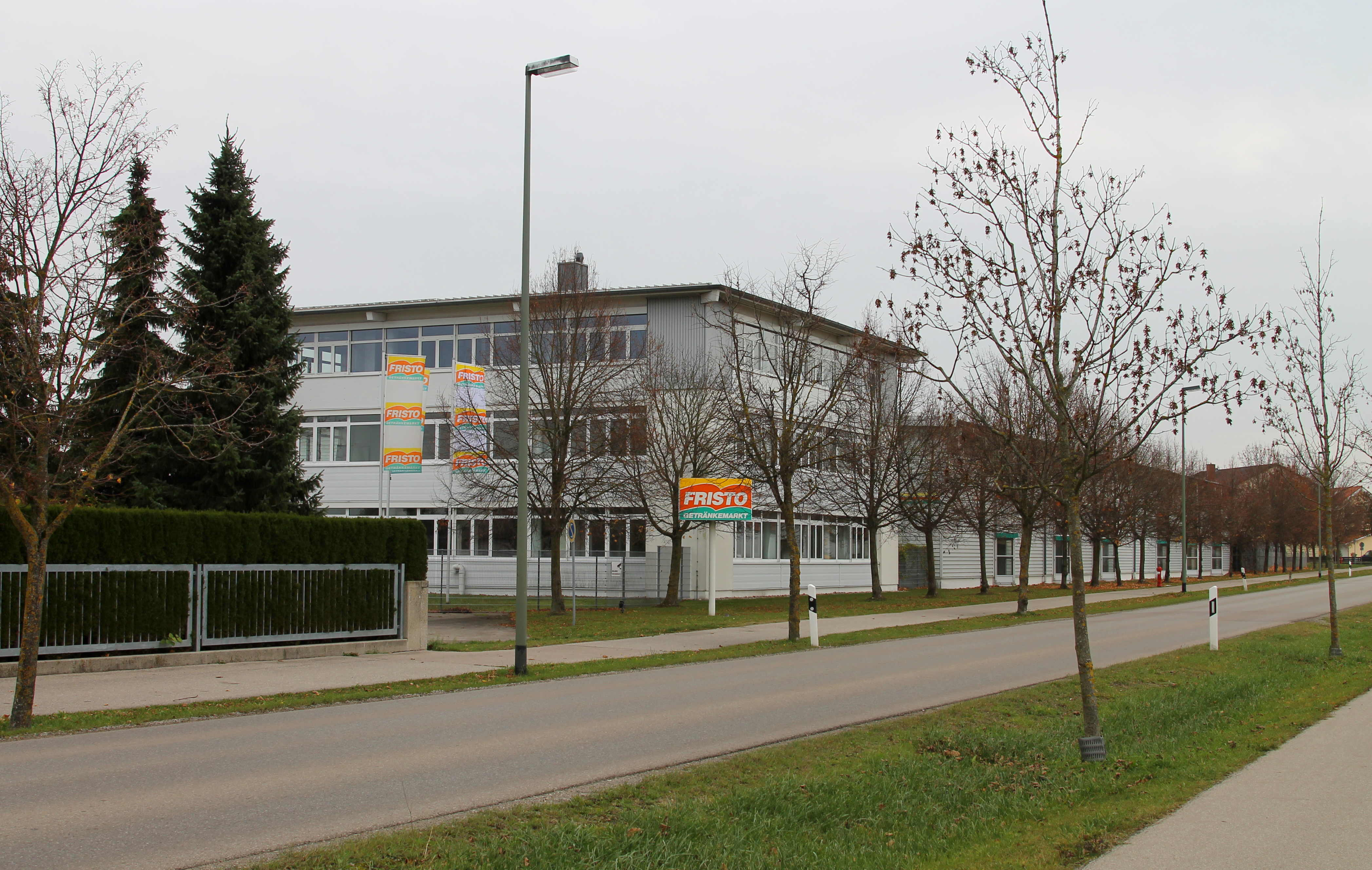 Werksgelände von Fristo in Buchloe